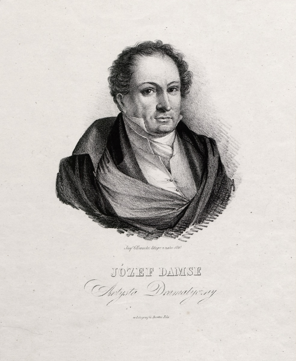 Józef Damse (1789-1852) - Zakład Litograficzny Banku Polskiego